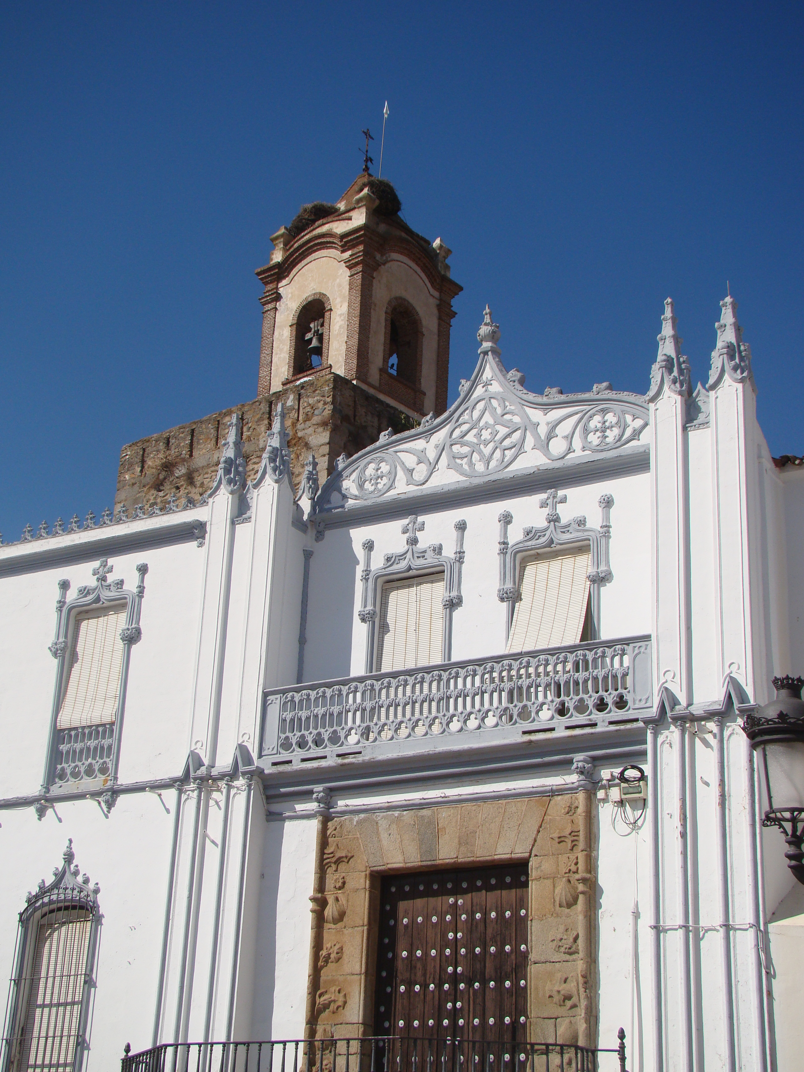 Paseo de la Constitución de Fregenal de la Sierra